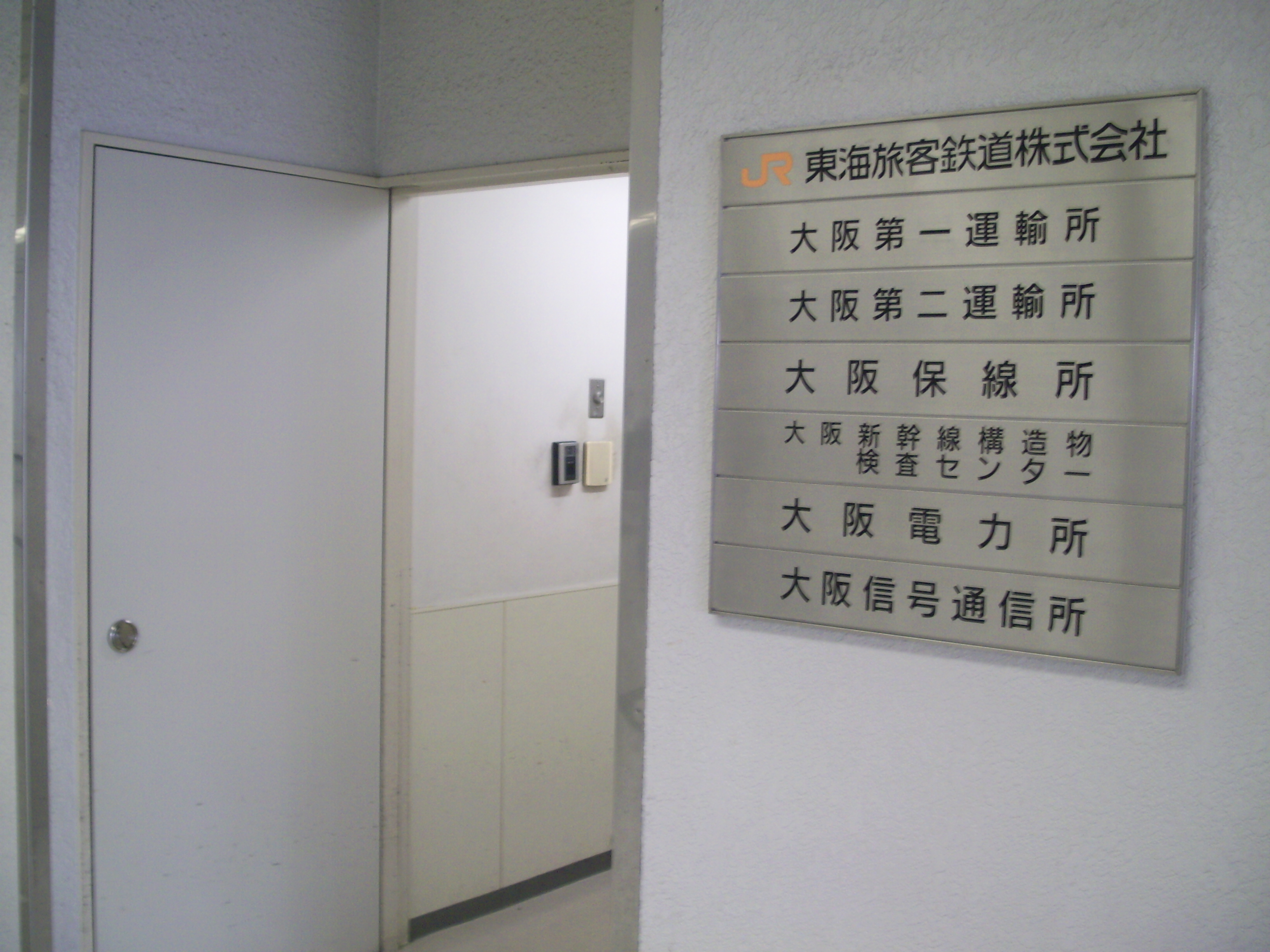 東海道新幹線大阪第一・第二運輸所、大阪保線所、大阪新幹線構造物検査センター、大阪電力所、大阪信号通信所の看板。新大阪駅の高架下に居を構える。 ㊟カメラを起動すると日付機能が出荷時のものに初期化されるため、ファイル履歴の投稿日時とメタデータの原画像データの生成日時が異なります（本概要欄の下記日付が撮影日）